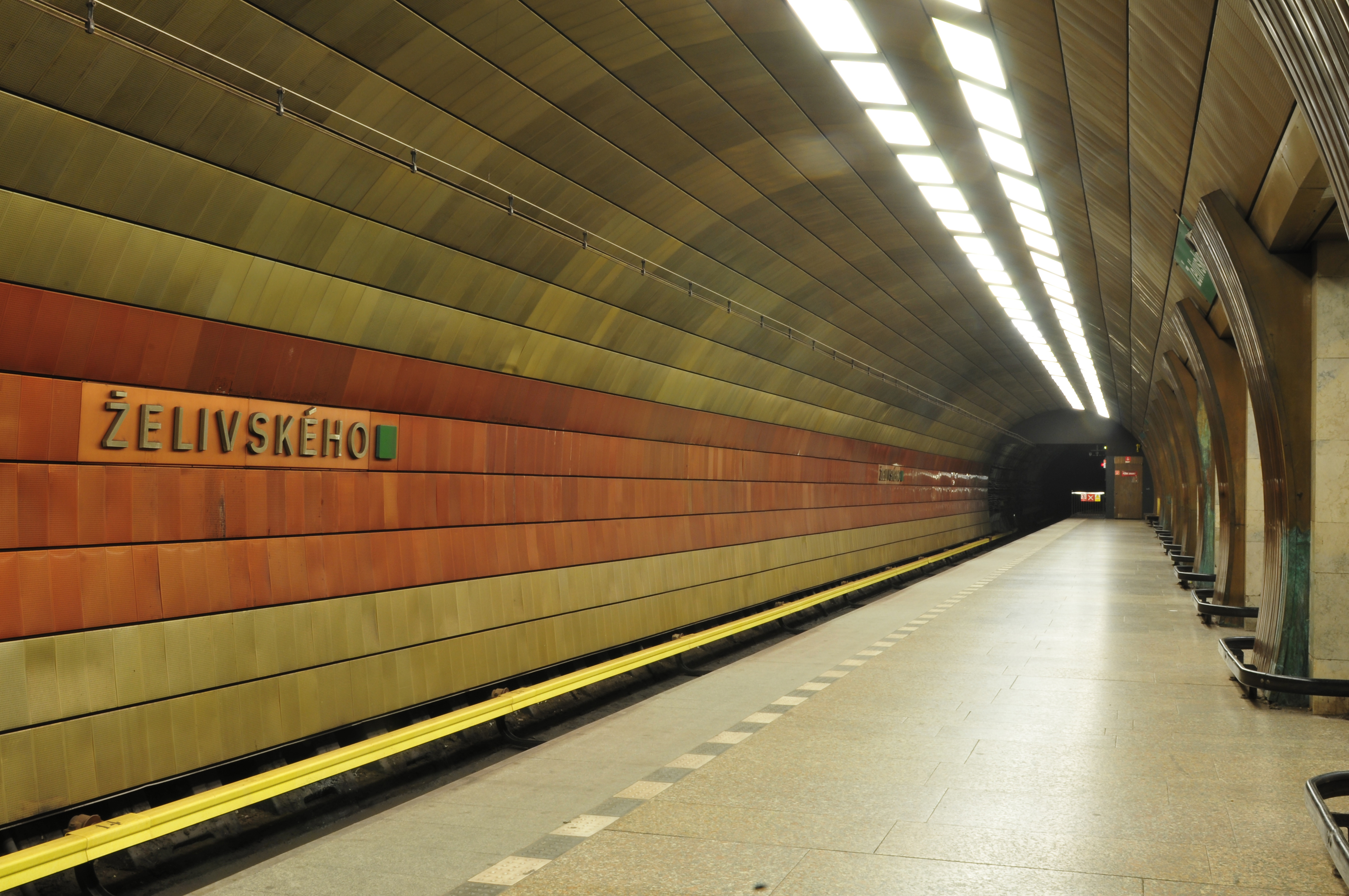 Metro Praha